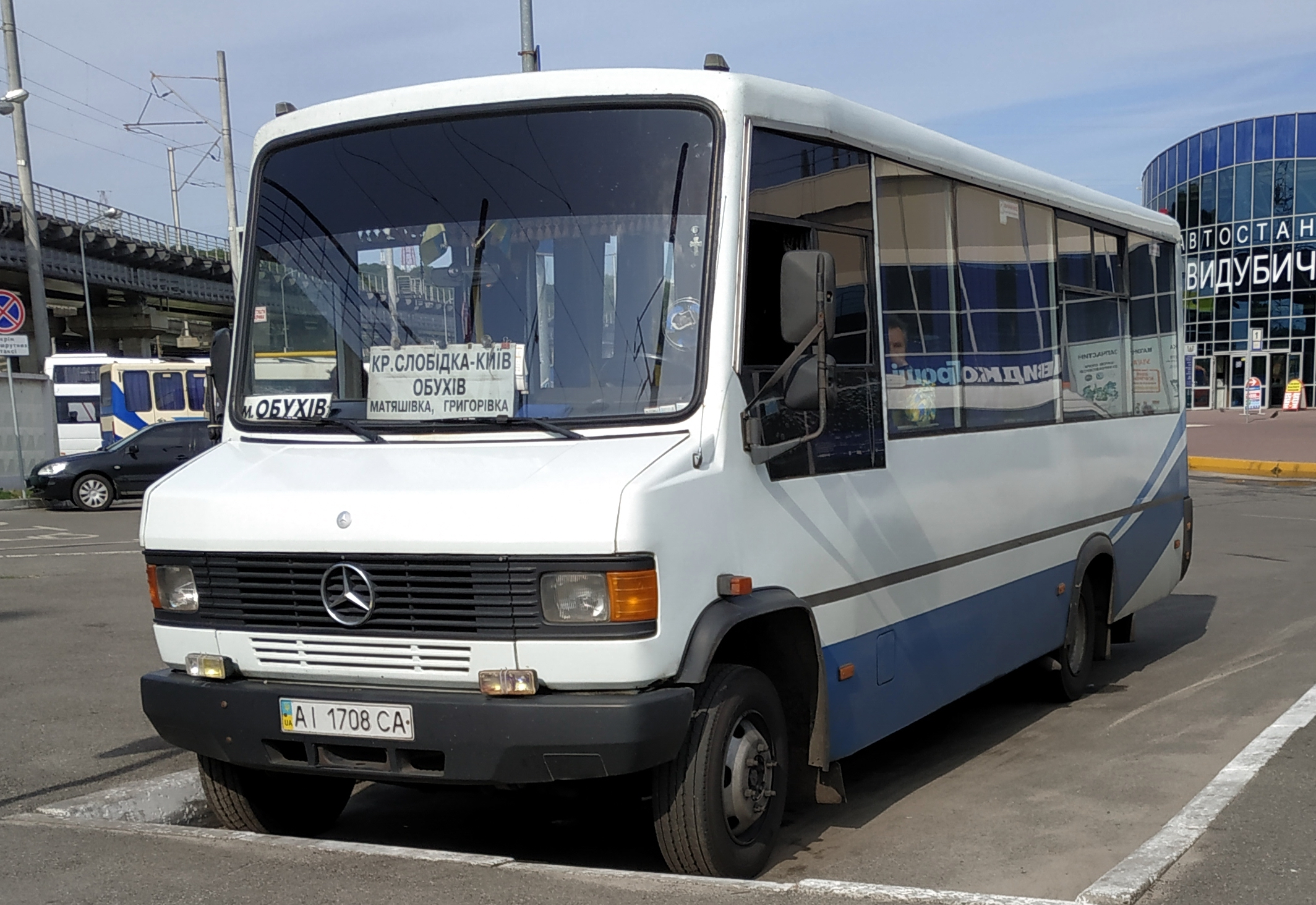 Автобус ГалАЗ-3209.10, Киев, автостанция Выдубичи, 2019 г.